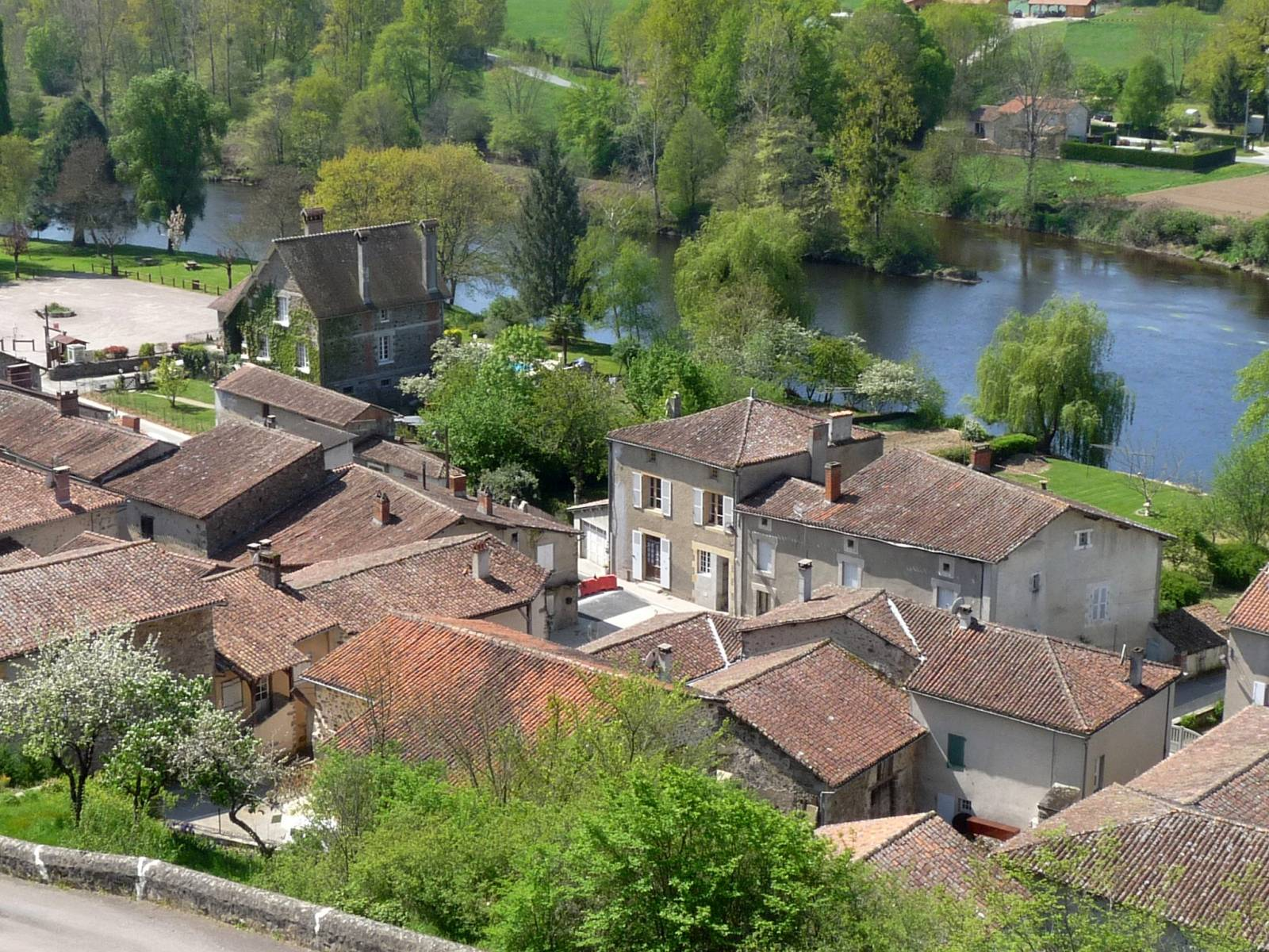 Vue du château, St-Germain-de-Confolens, Charente, France